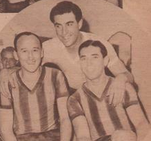 Clemente Verga, Pedro Aráiz y Pedro Perucca, futbolistas de Rosario Central en 1941.